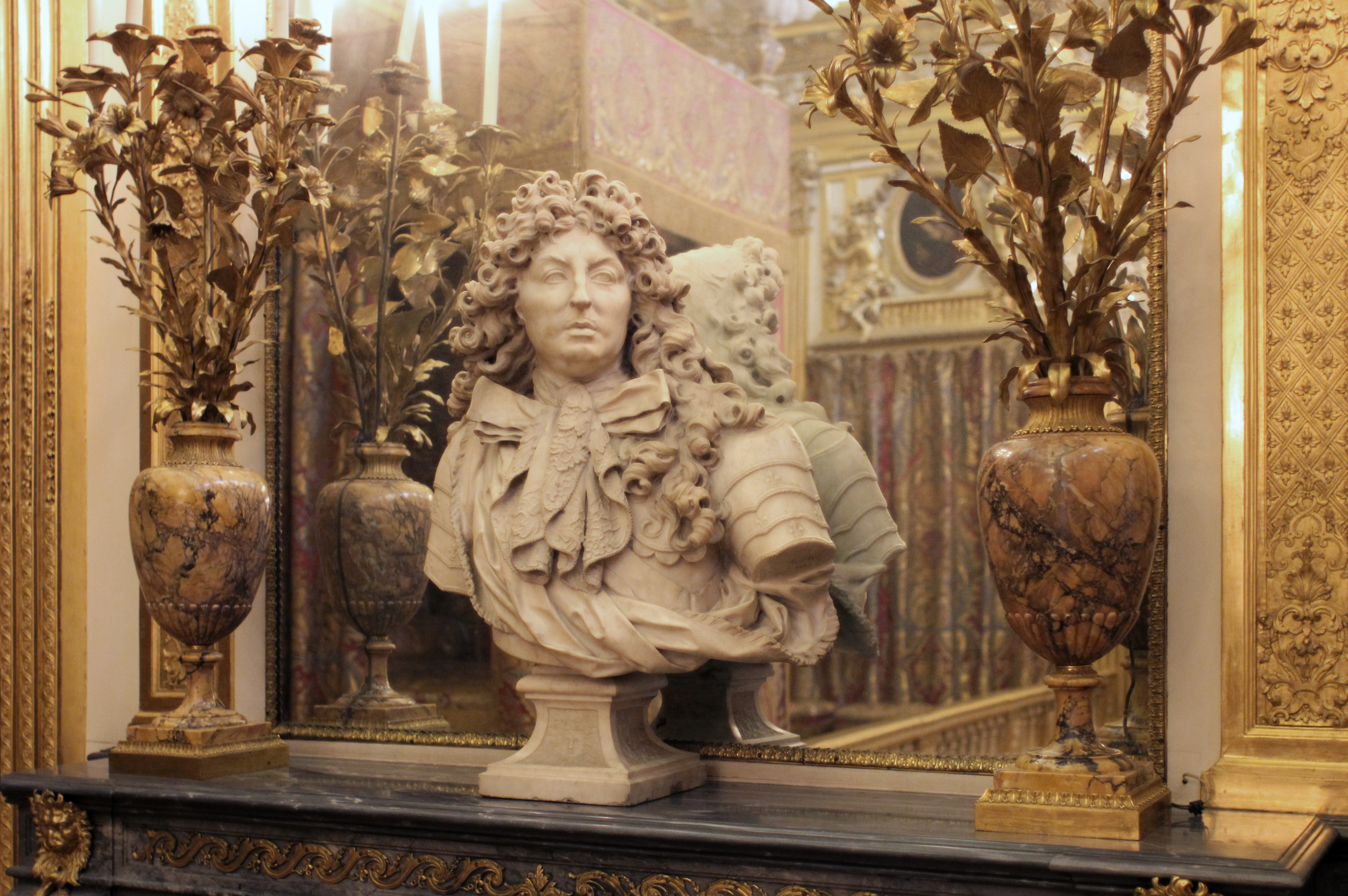 Versailles, chambre du roi, dessus de cheminée : buste de Louis XIV par Antoine Coysevox, encadré par deux candélabres livrés pour le Comte de Provence